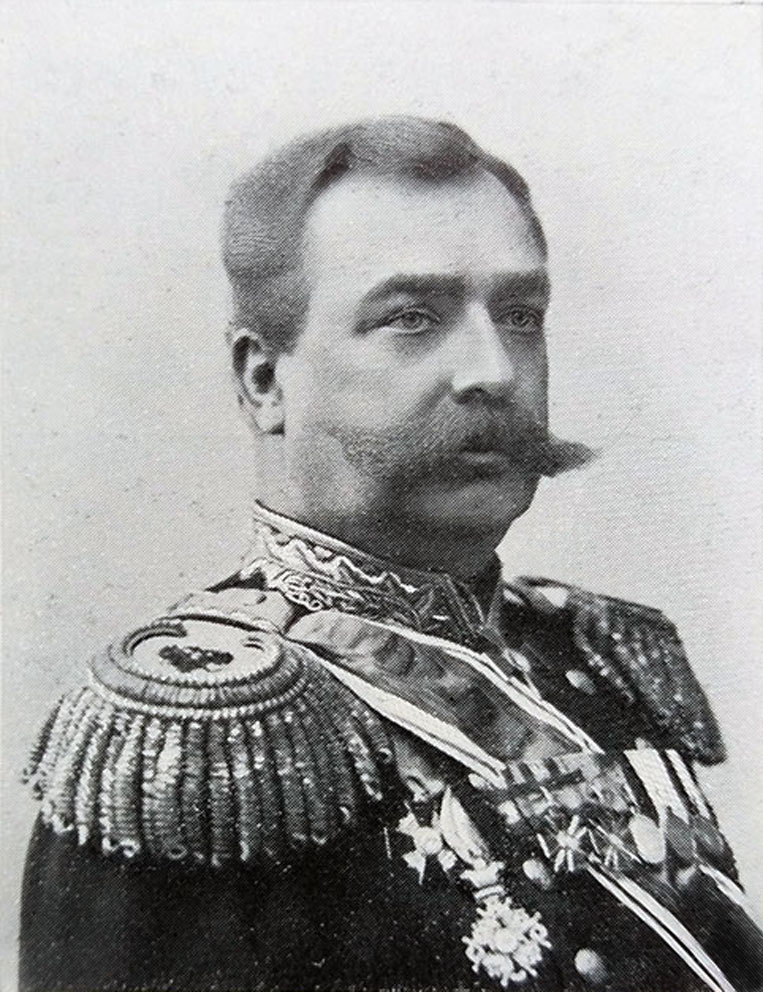 Колтовский, Митрофан Егорович (1836-1896).